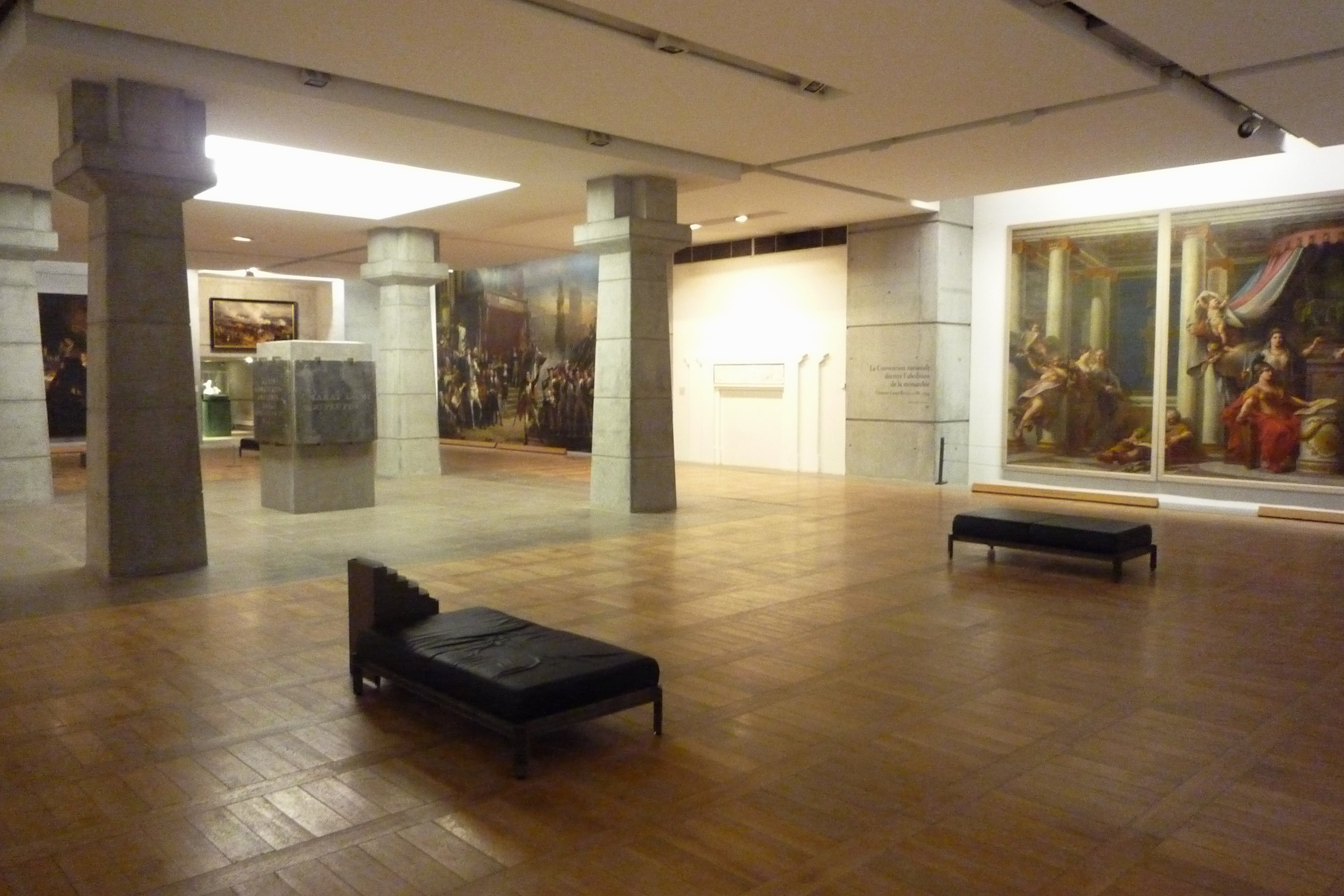 Salle de la République, Musée de la Révolution française. Vizille (Isère)